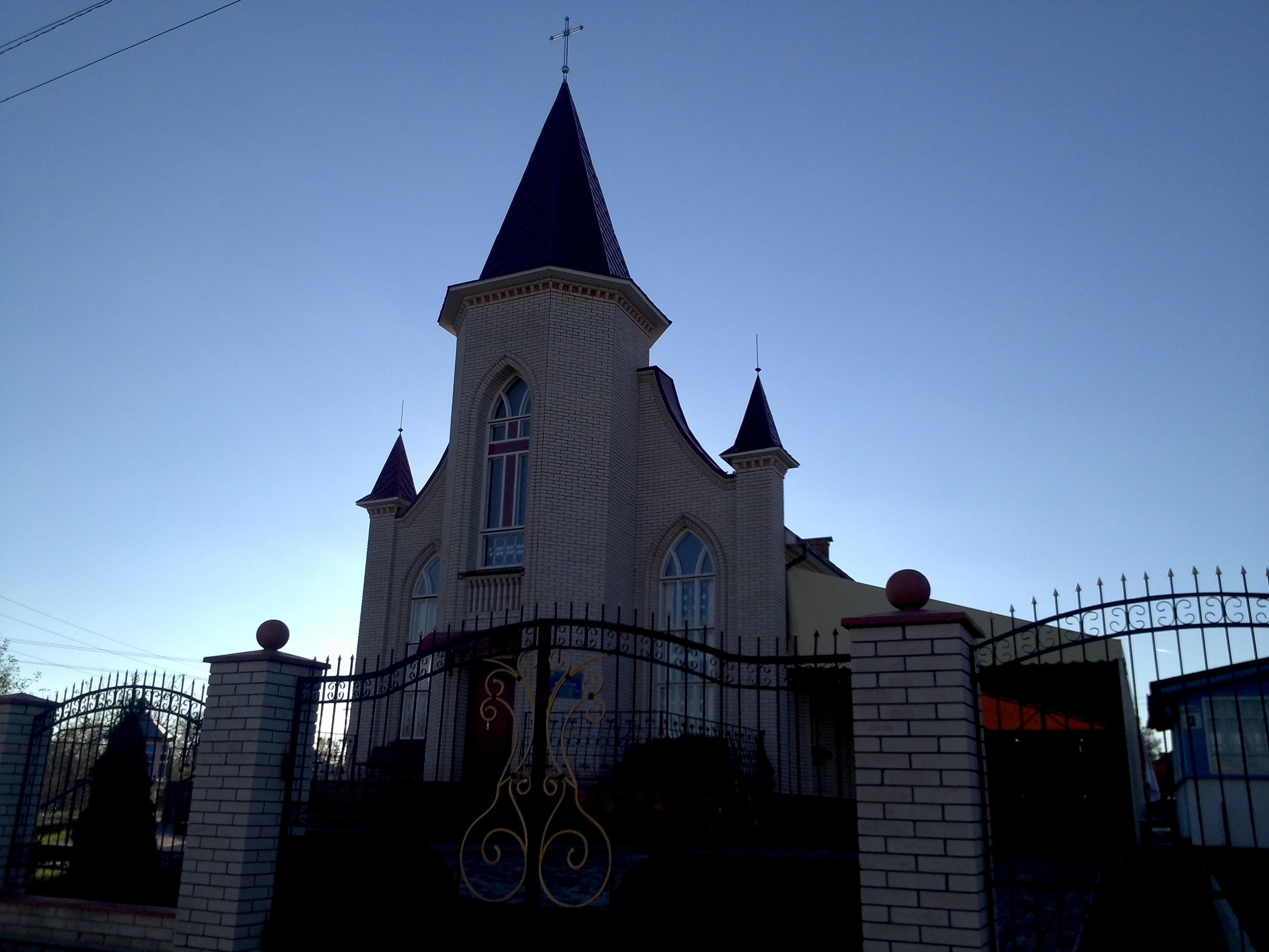 с. Росоша. Церква ЄХБ